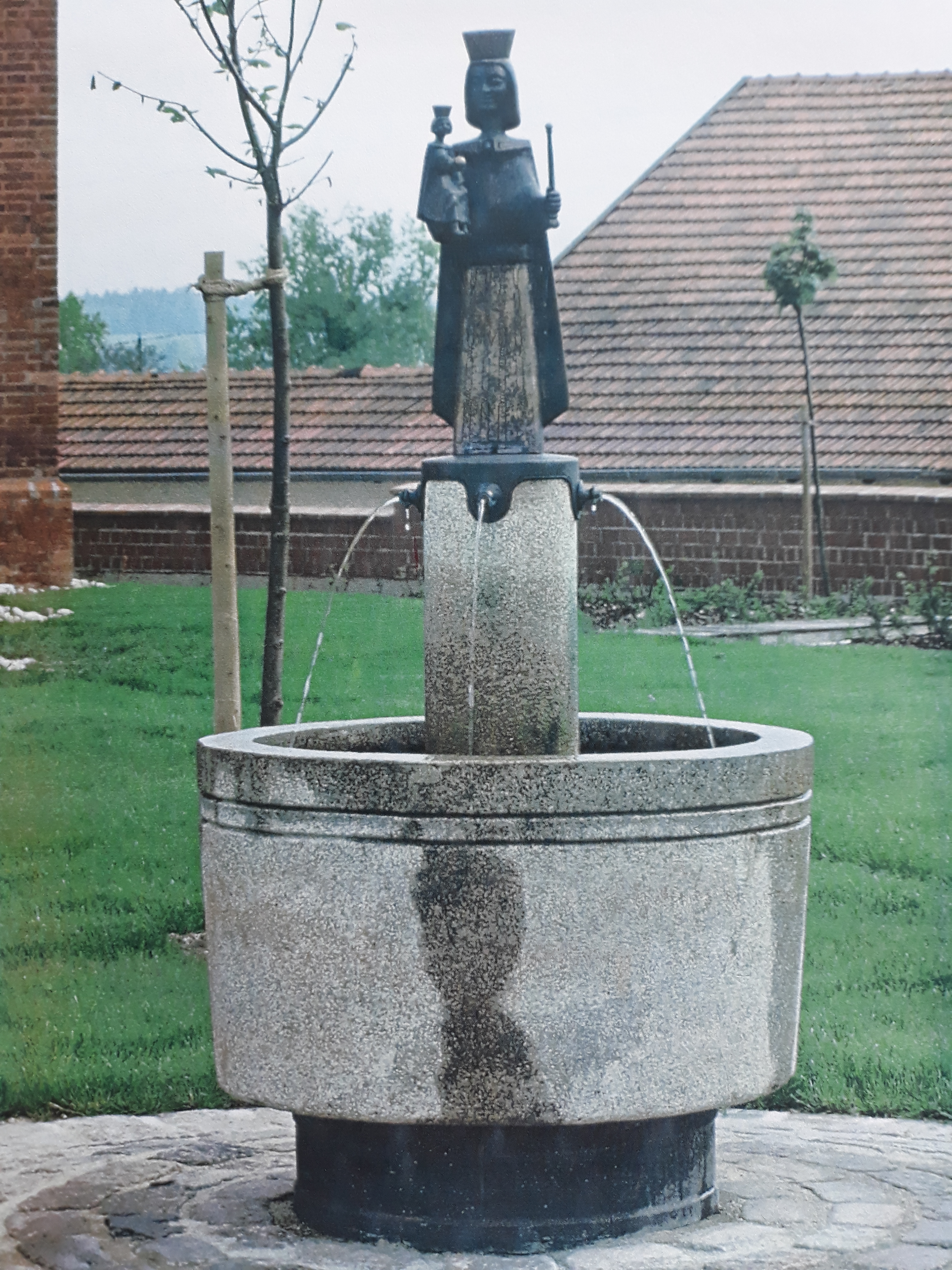 Willi Baumeister Marienbrunnen Herbertsfelden